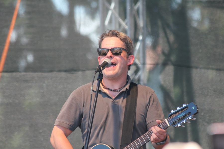 Aleš Háma, moderátor, kytarista a zpěvák hudebního uskupení Hamleti hraje na Dni Kozla 2012.